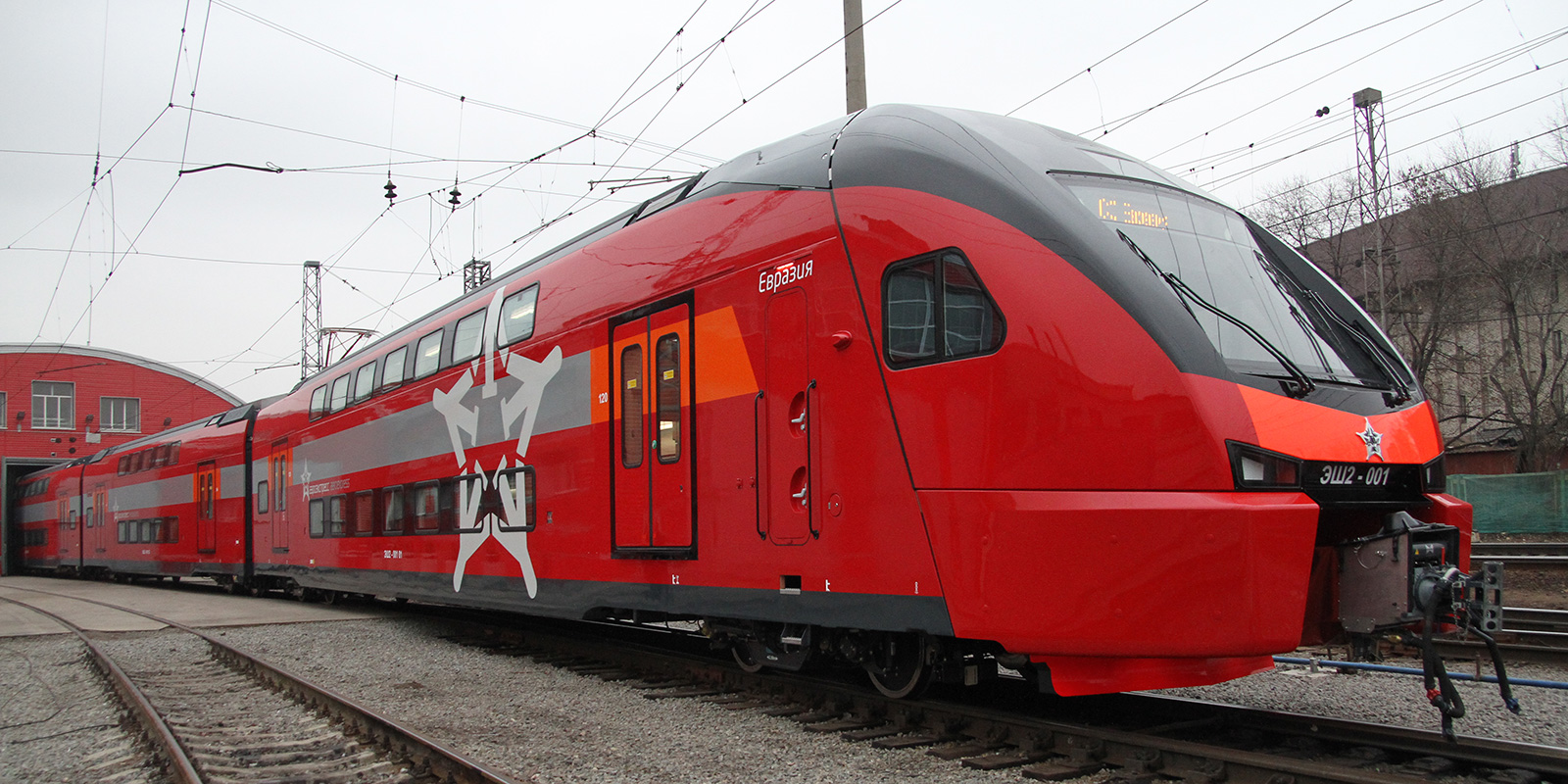 Электропоезд ЭШ2-001 Евразия на выезде из депо имени Ильича